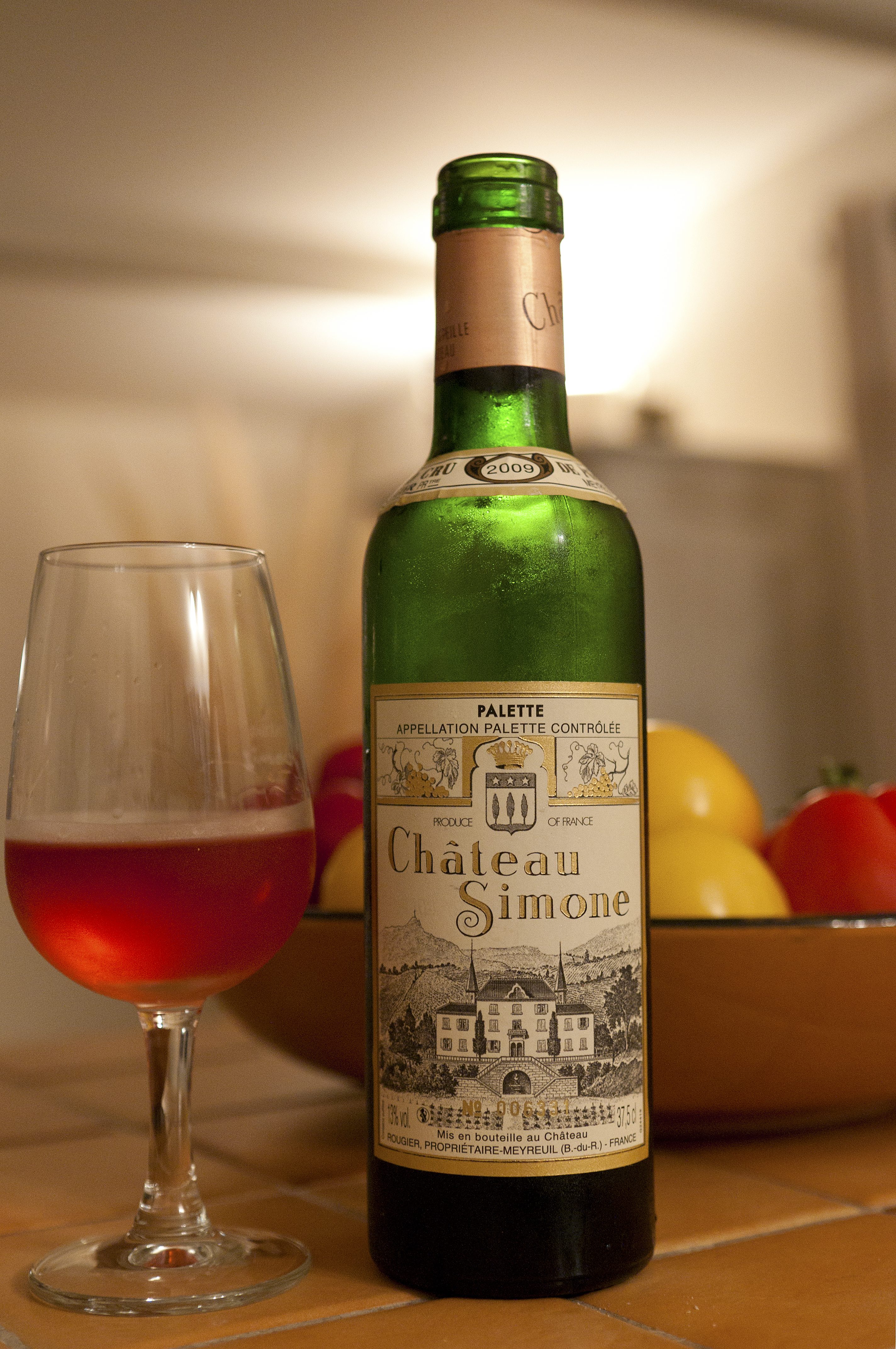 Château Simone AOC Palette